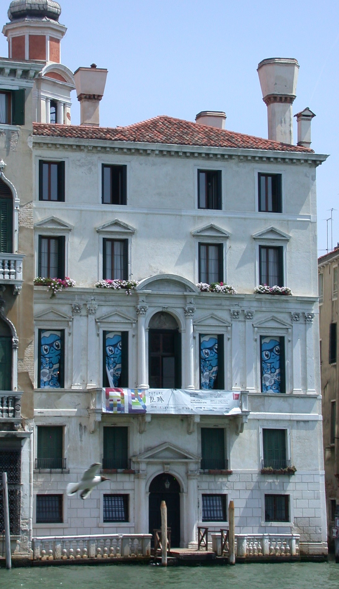 Il Palazzo Smith Mangilli Valmarana.